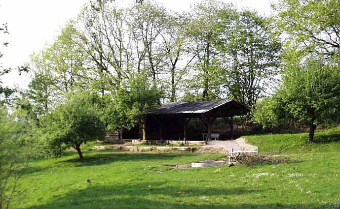 Bild des Schimborner Zeltplatzes